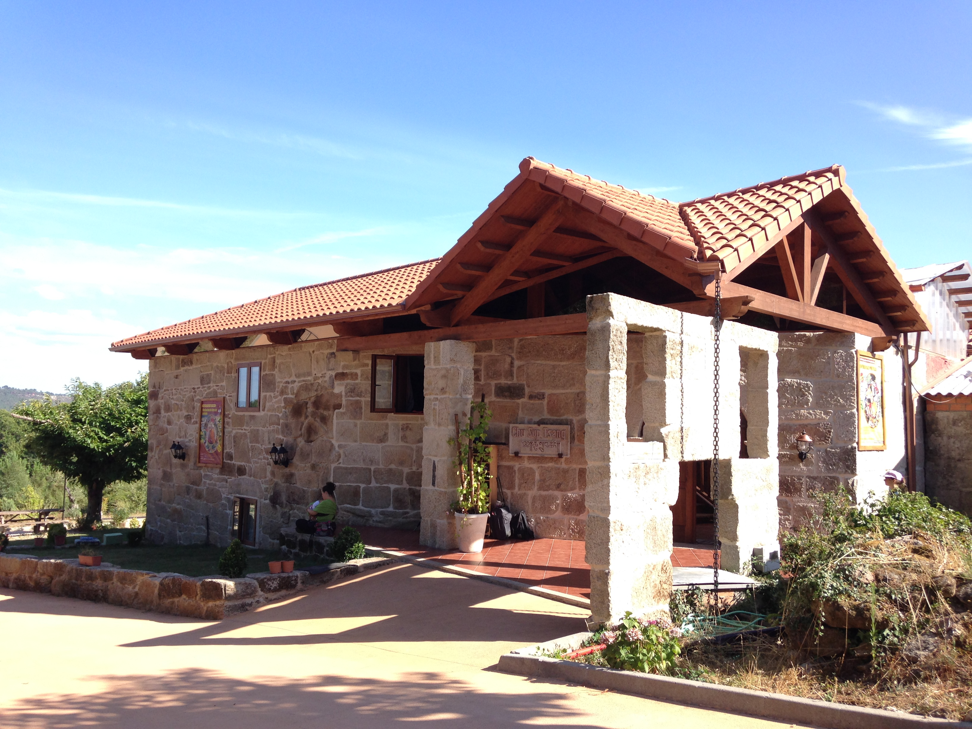 Fachada do Mosteiro Budista de Ventoselo (San Amaro, Ourense)